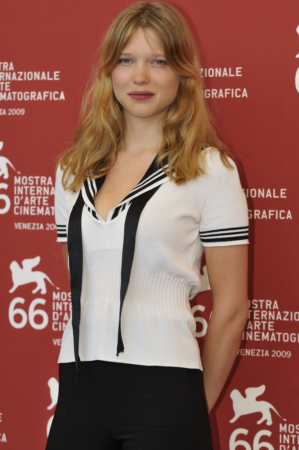 66ème Festival du Cinéma de Venise (Mostra), 3ème jour (04/09/2009) Photocall avec Léa Seydoux, Bruno Todeschini, Jessica Hausner (Réalisateur) pour le film : Lourdes